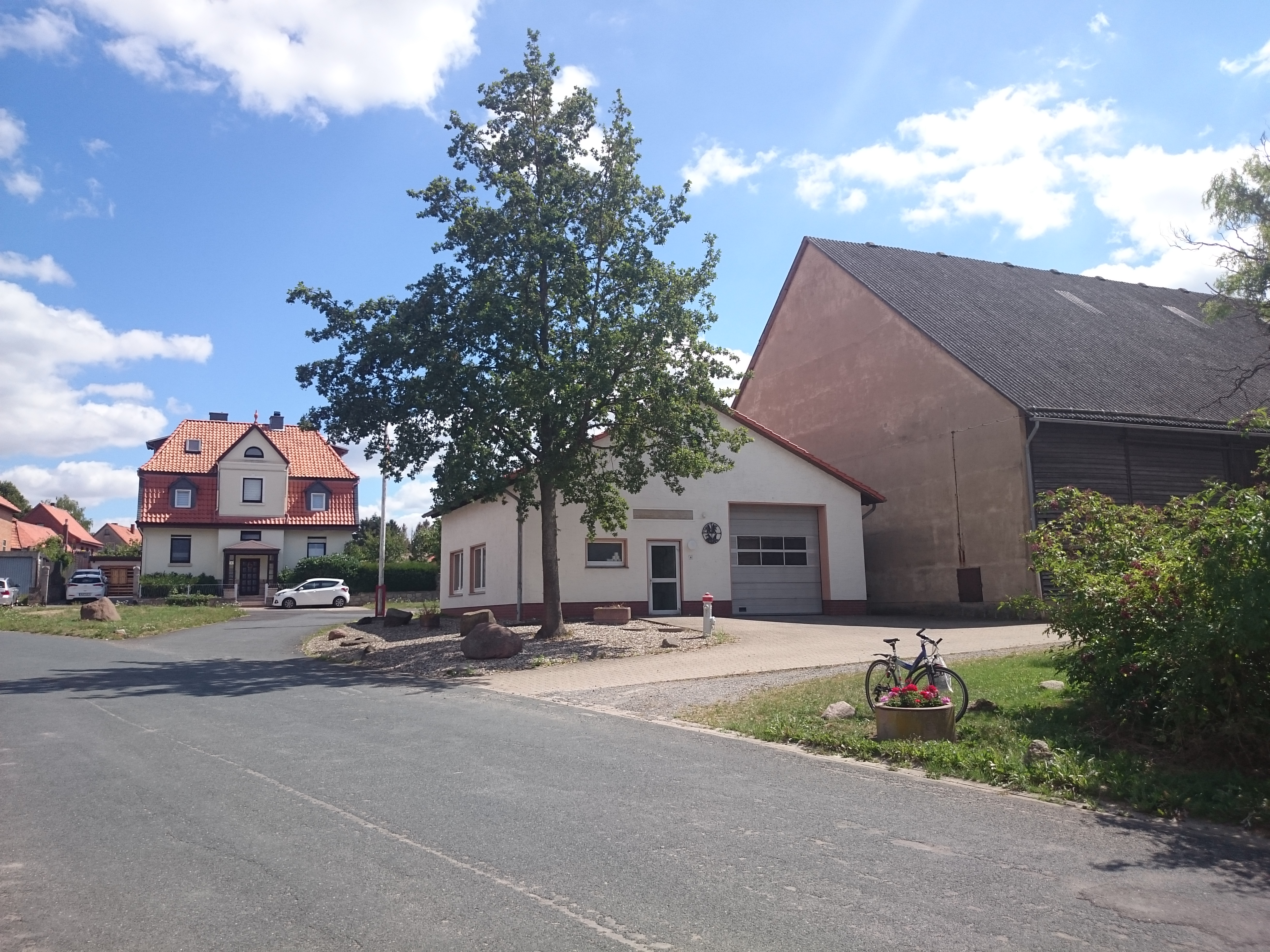 Beschreibung